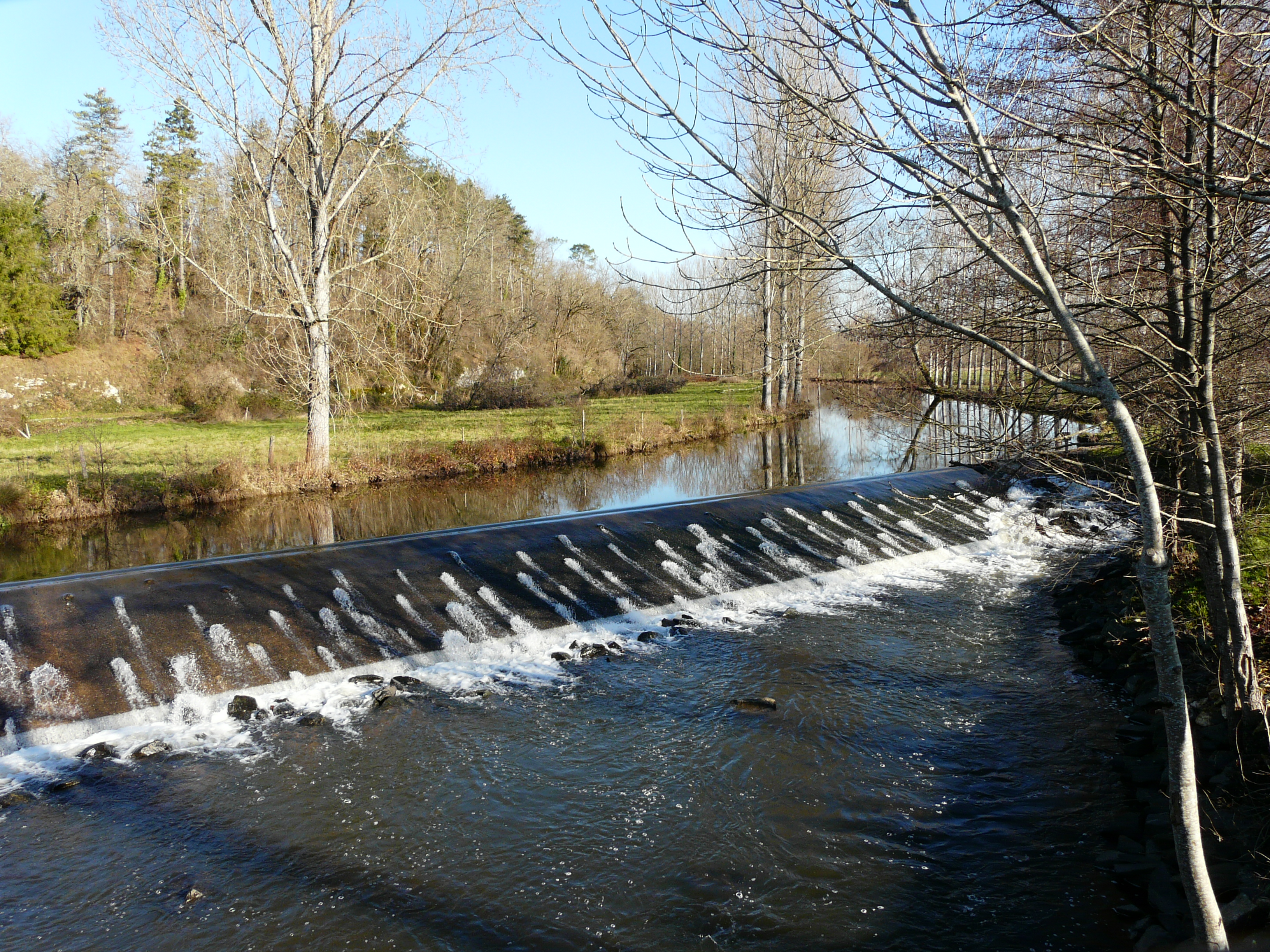 La Côle à Saint-Pierre-de-Côle, Dordogne, France